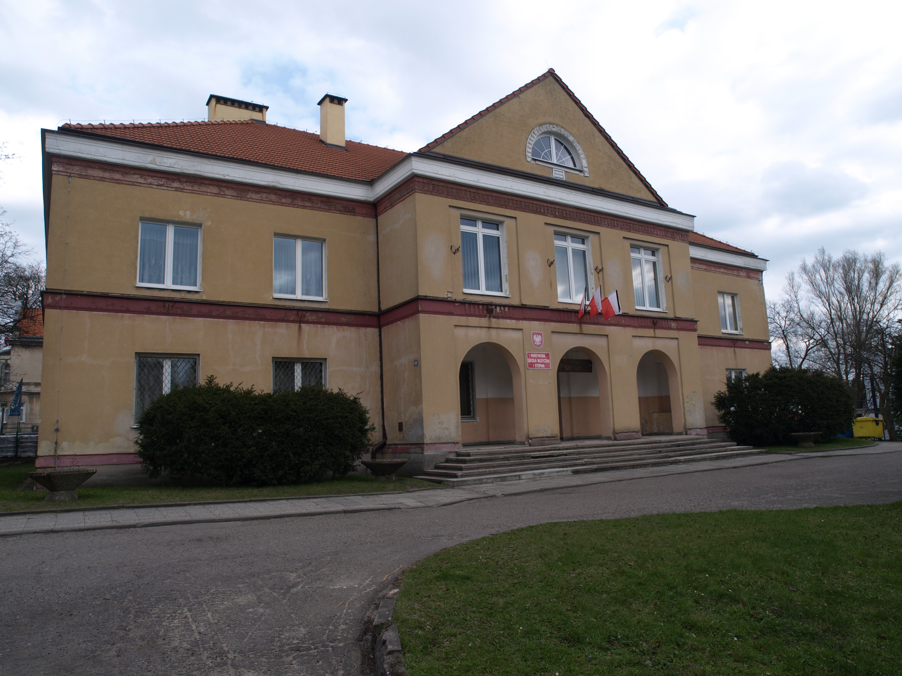 Kościerzyna, ul. Dworcowa - szkoła muzyczna